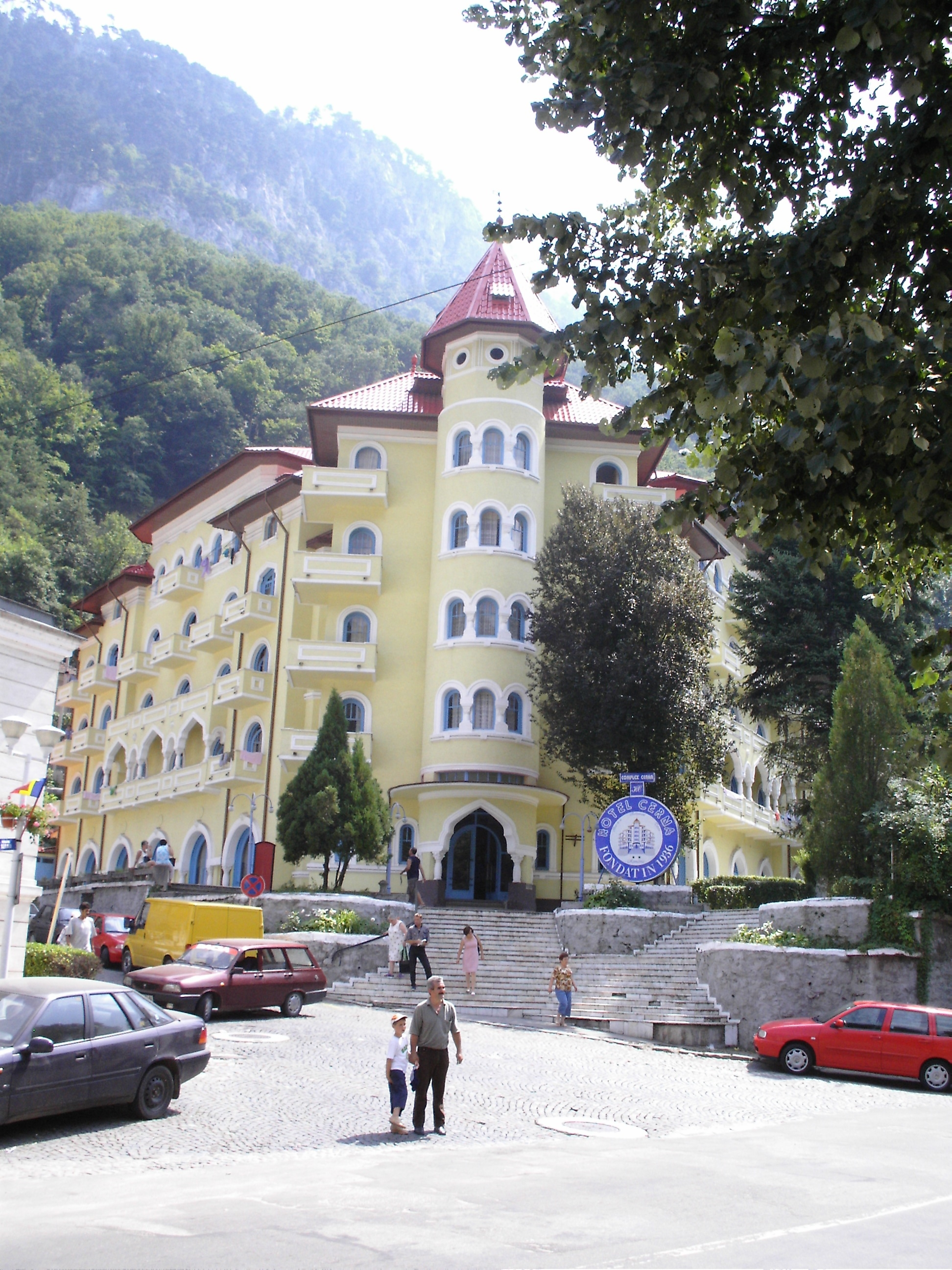 Hotel "Cerna"